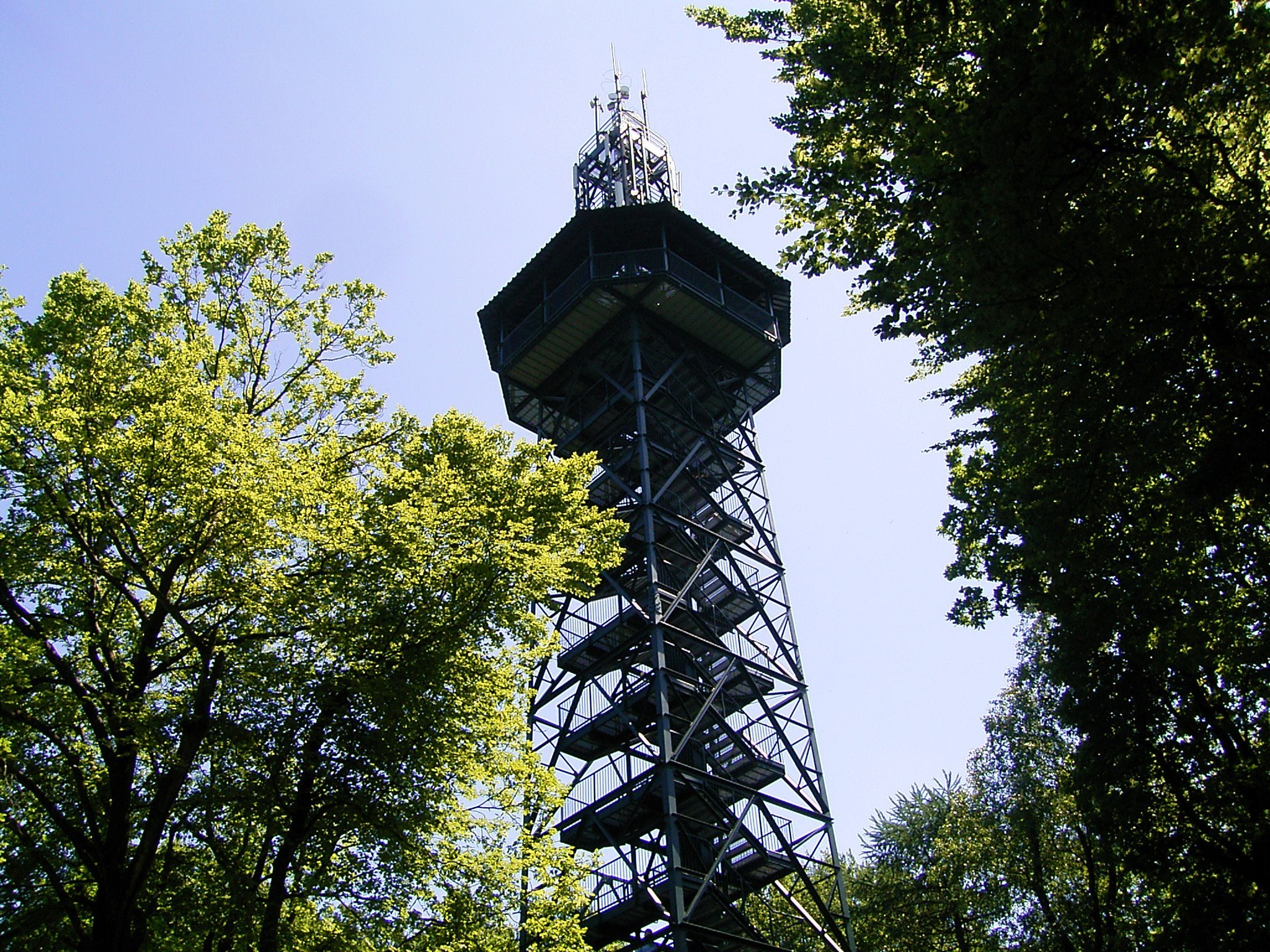 Aussichtsturm Unnenberg in Gummersbach-Unnenberg